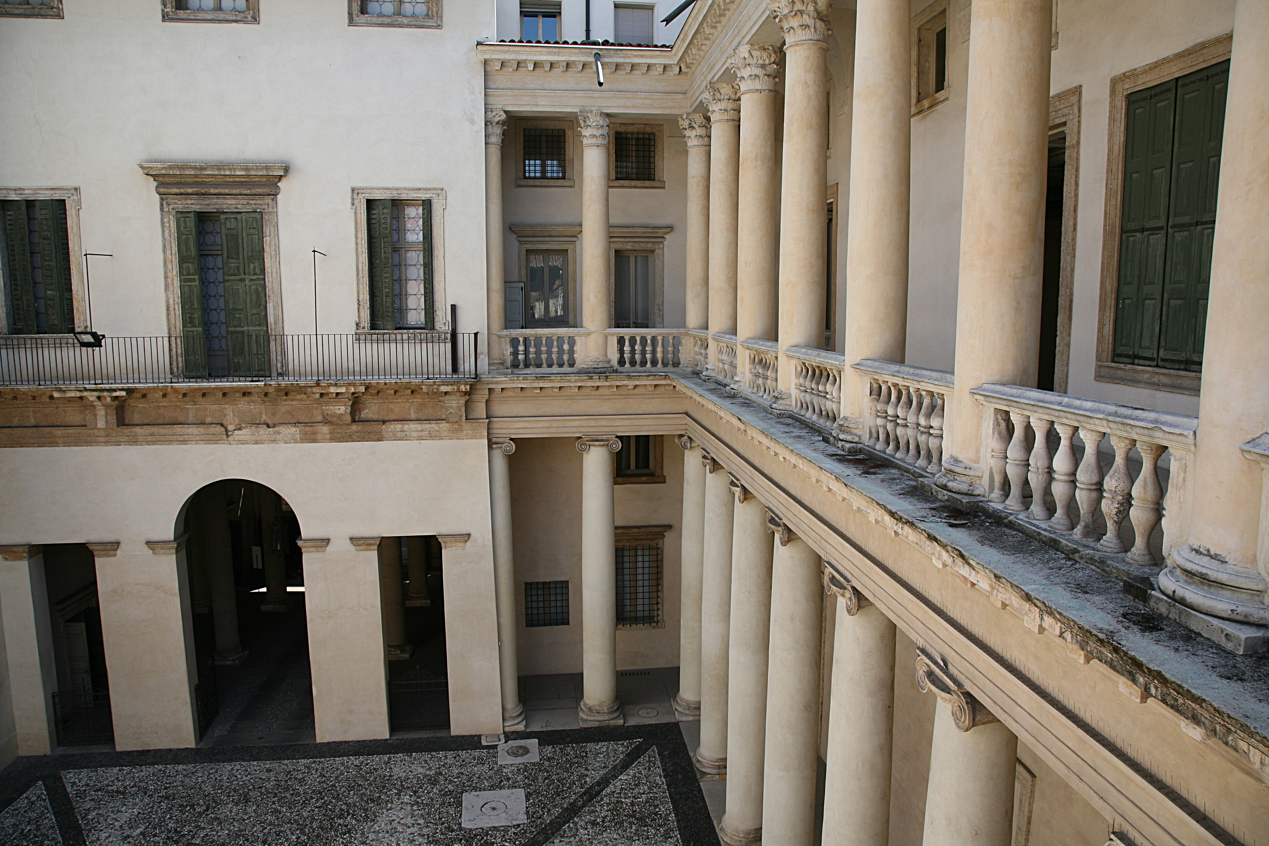 Palazzo Barbaran Da Porto in Vicenza